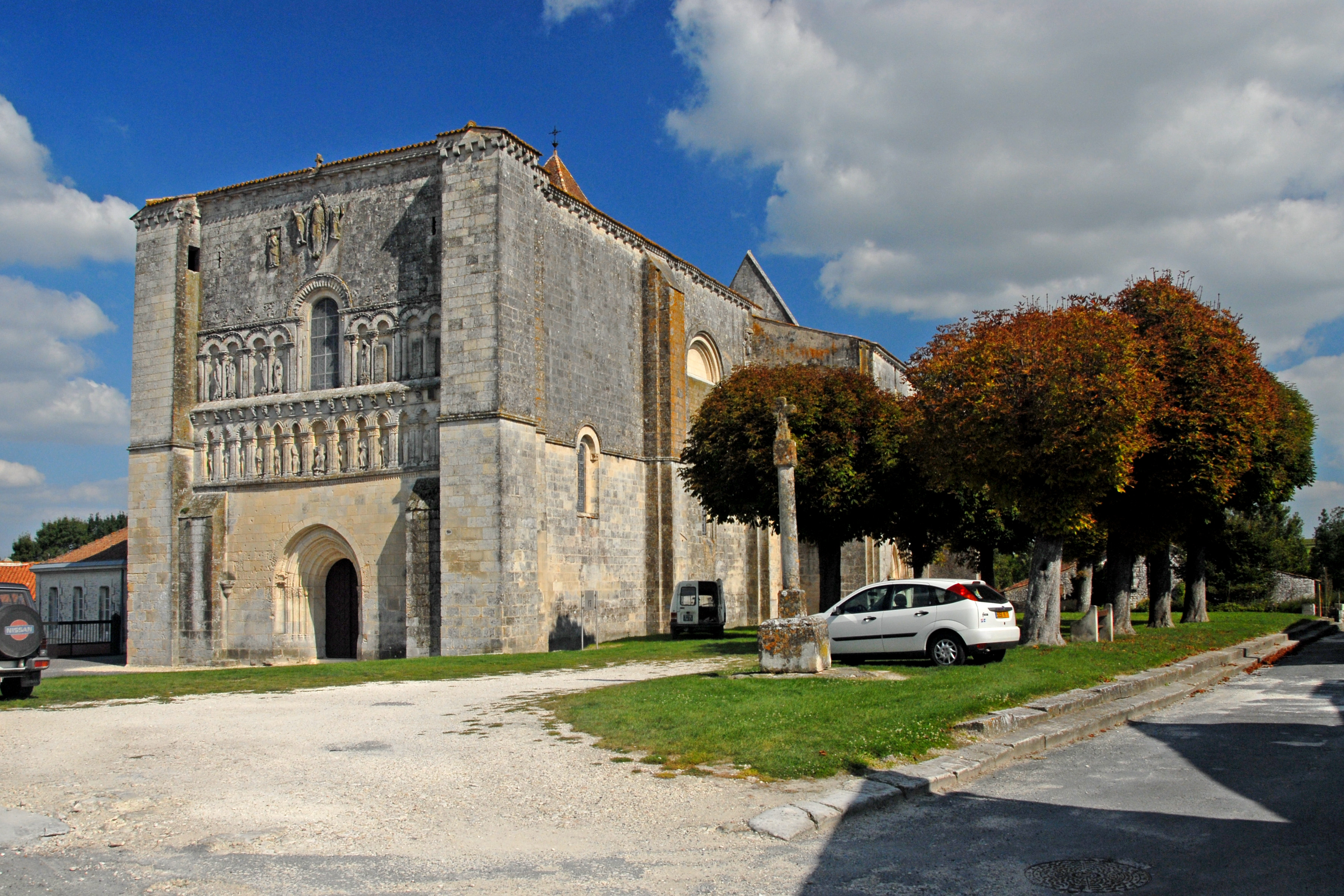 Pfarrkirche Saint-Pierre-de-Pérignac, von südwest